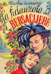 Copertina romanzo d'appendice di Carolina Invernizio, morta nel 1916)